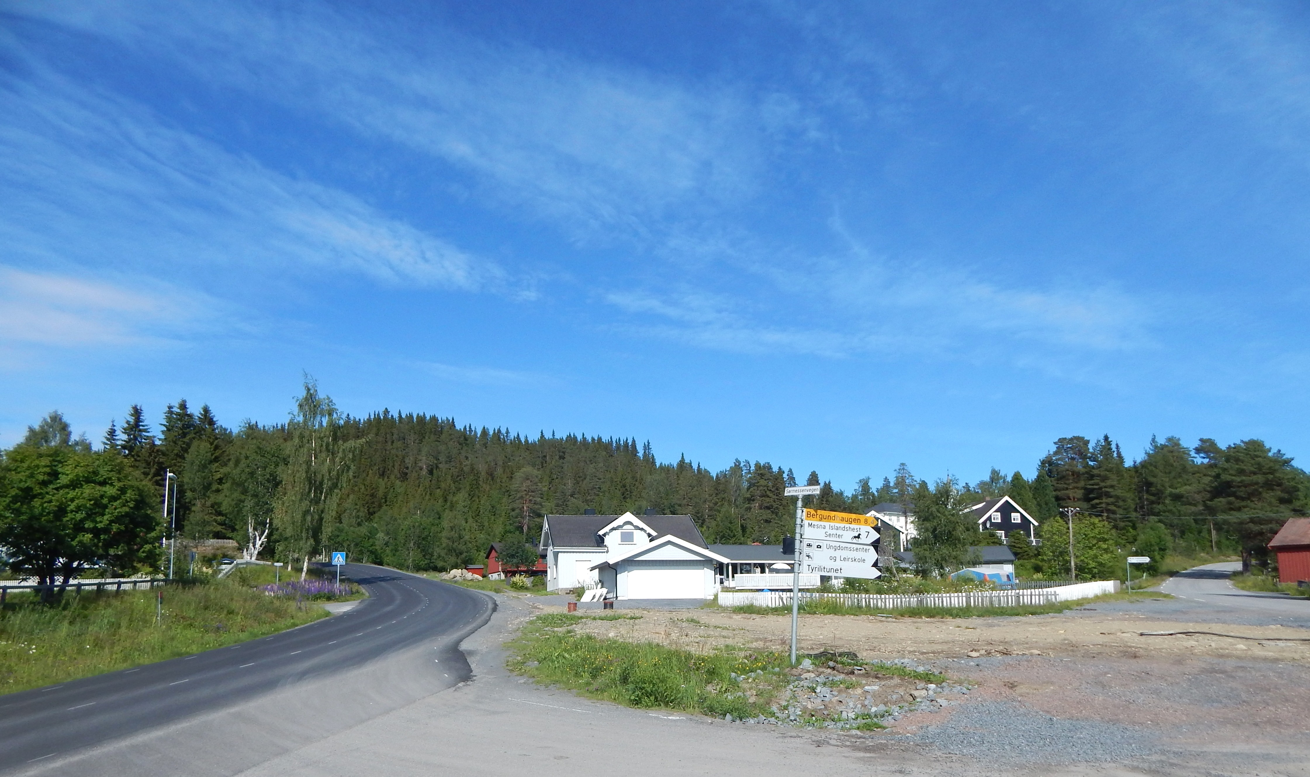 Fra Mesnali